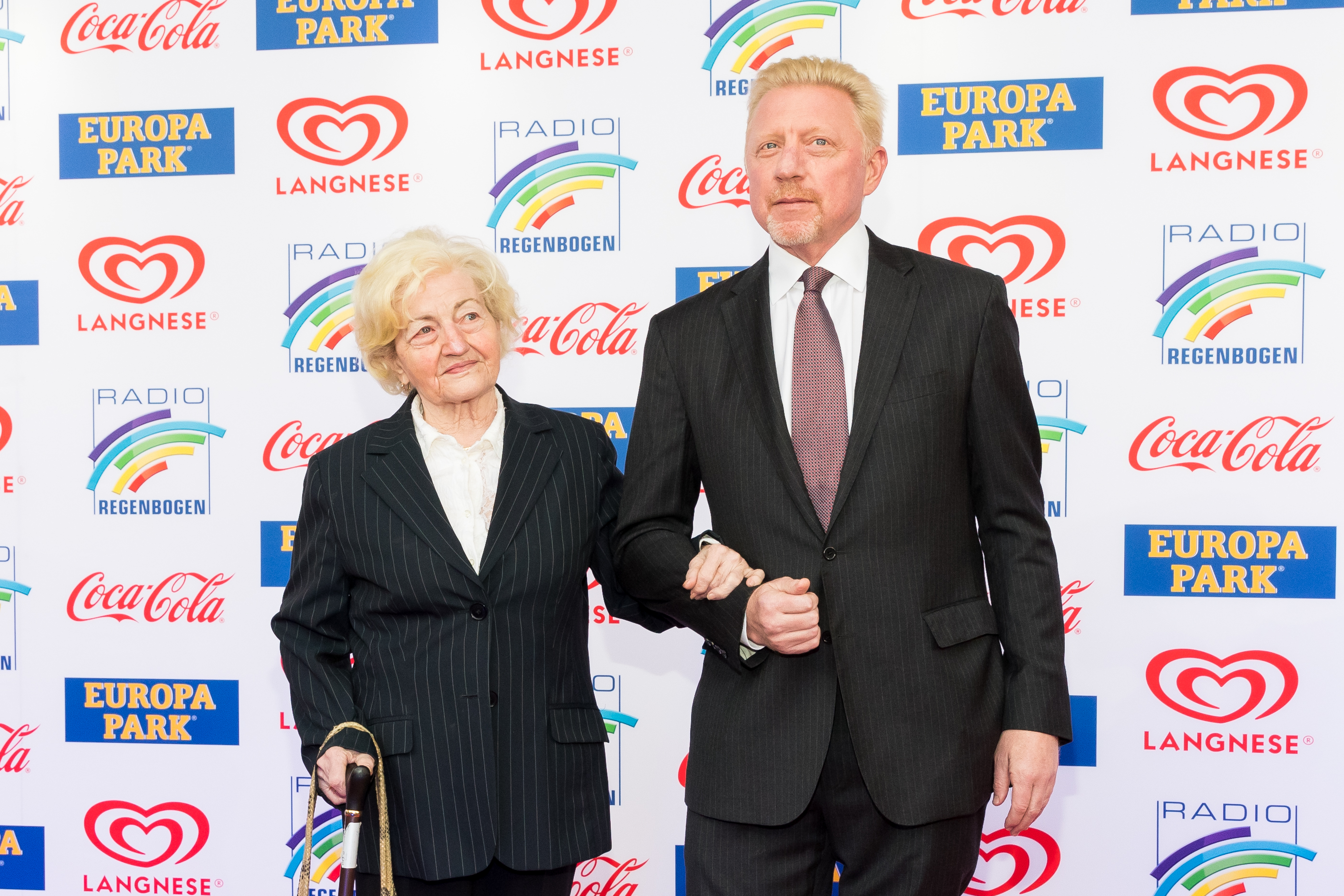 Boris Becker during Radio Regenbogen Award 2019 at Europapark, Rust, Baden-Württemberg, Germany on 2019-04-12, Photo: Sven Mandel